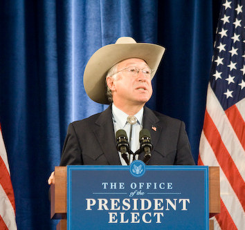 オバマ大統領から内務長官指名を受けたサラザール.